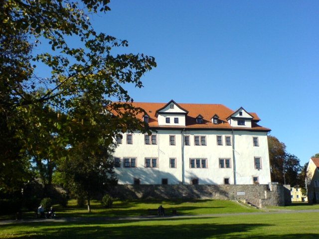 Frankenhauser Schloss